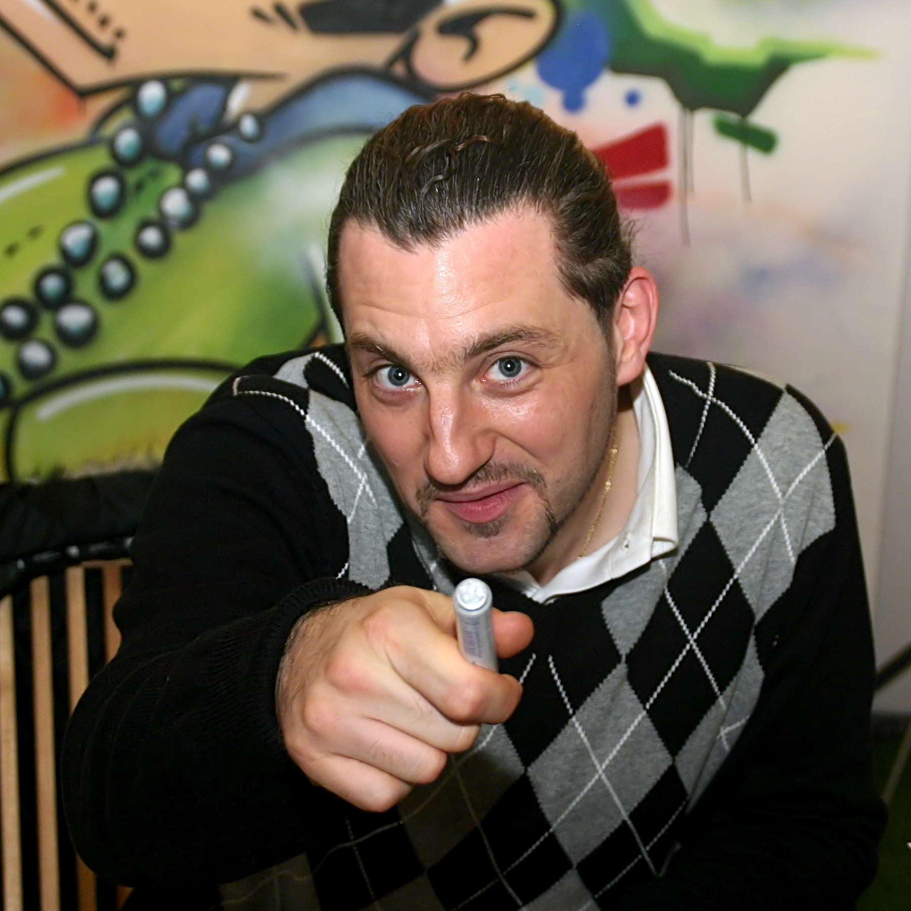 Das Bo bei einer Autogrammstunde auf der Jugendmesse YOU 2008 in Berlin.